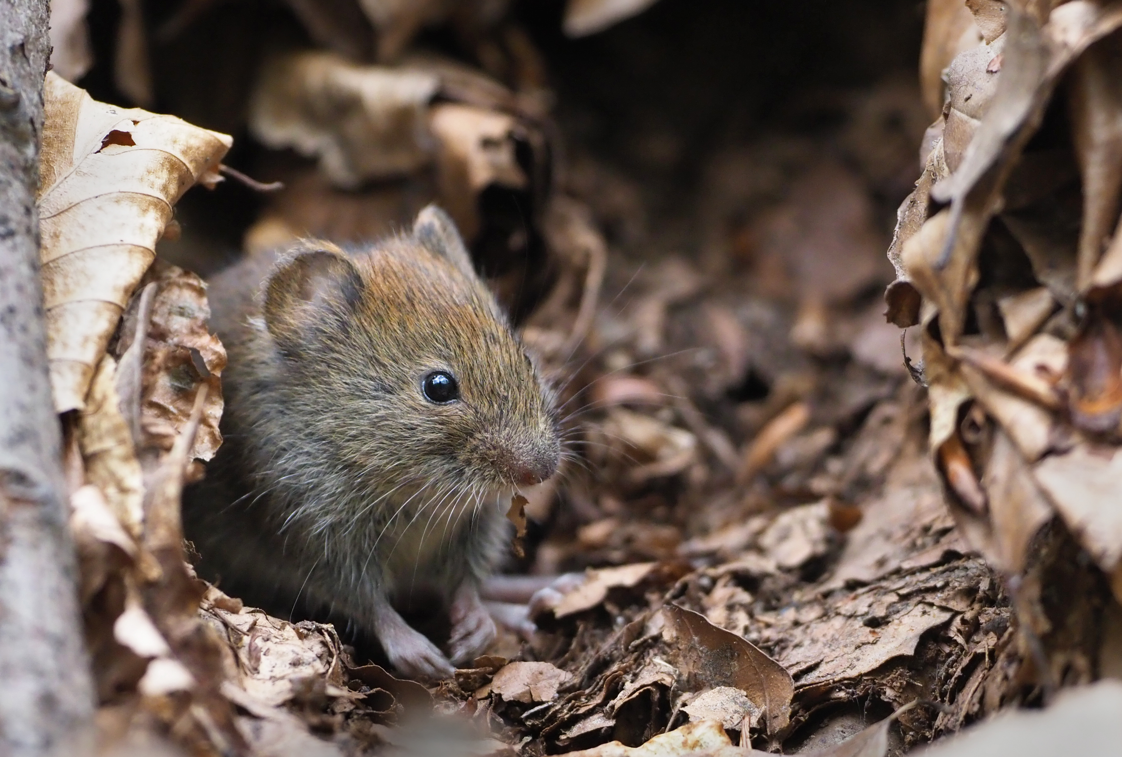 Bank vole (Myodes glareolus), Forêt de Soignes, Brussels